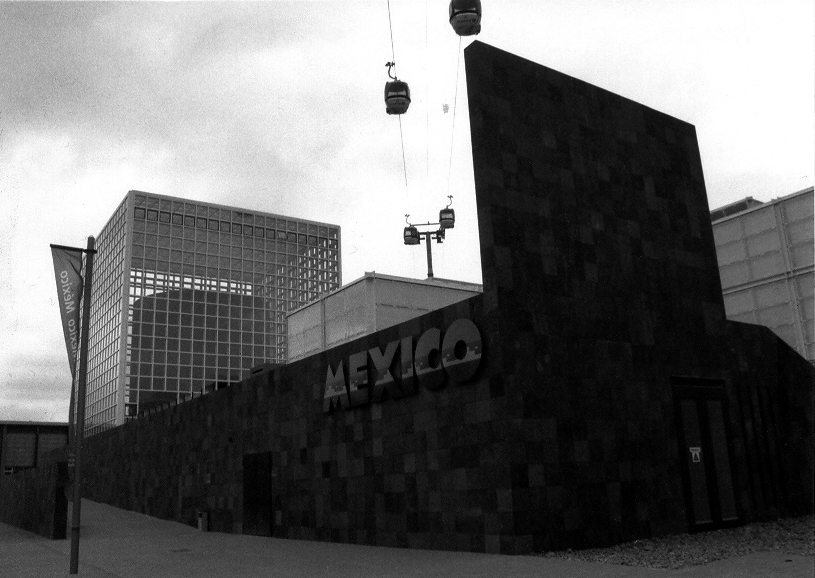 Exterior del Pabellón de México en la Expo 2000 Hannover